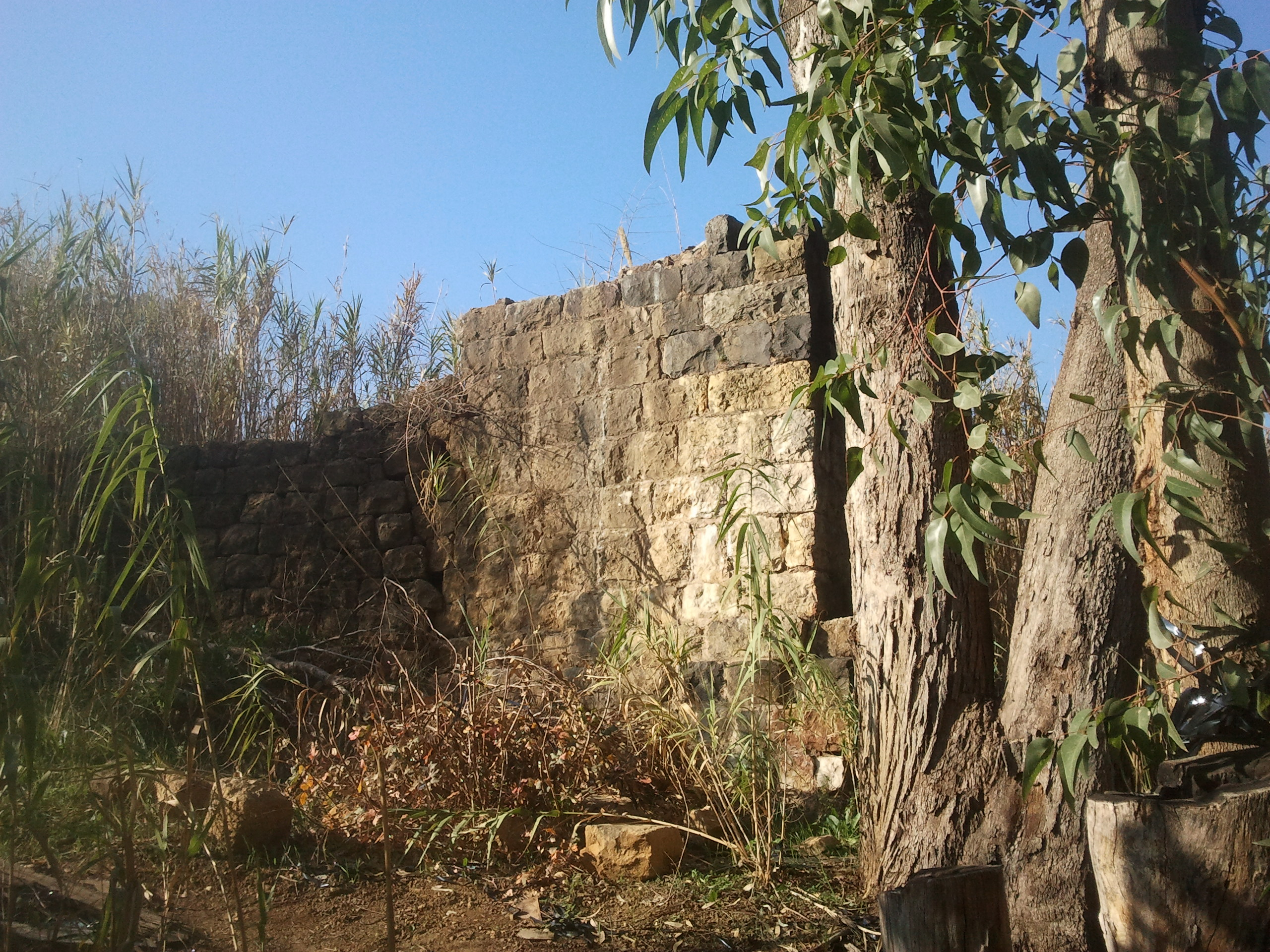 פארק הזהב הוא הפארק המרכזי העירוני בקרית שמונה. בתוכו זורם נחל עין זהב שרידי טחנת קמח ישנה